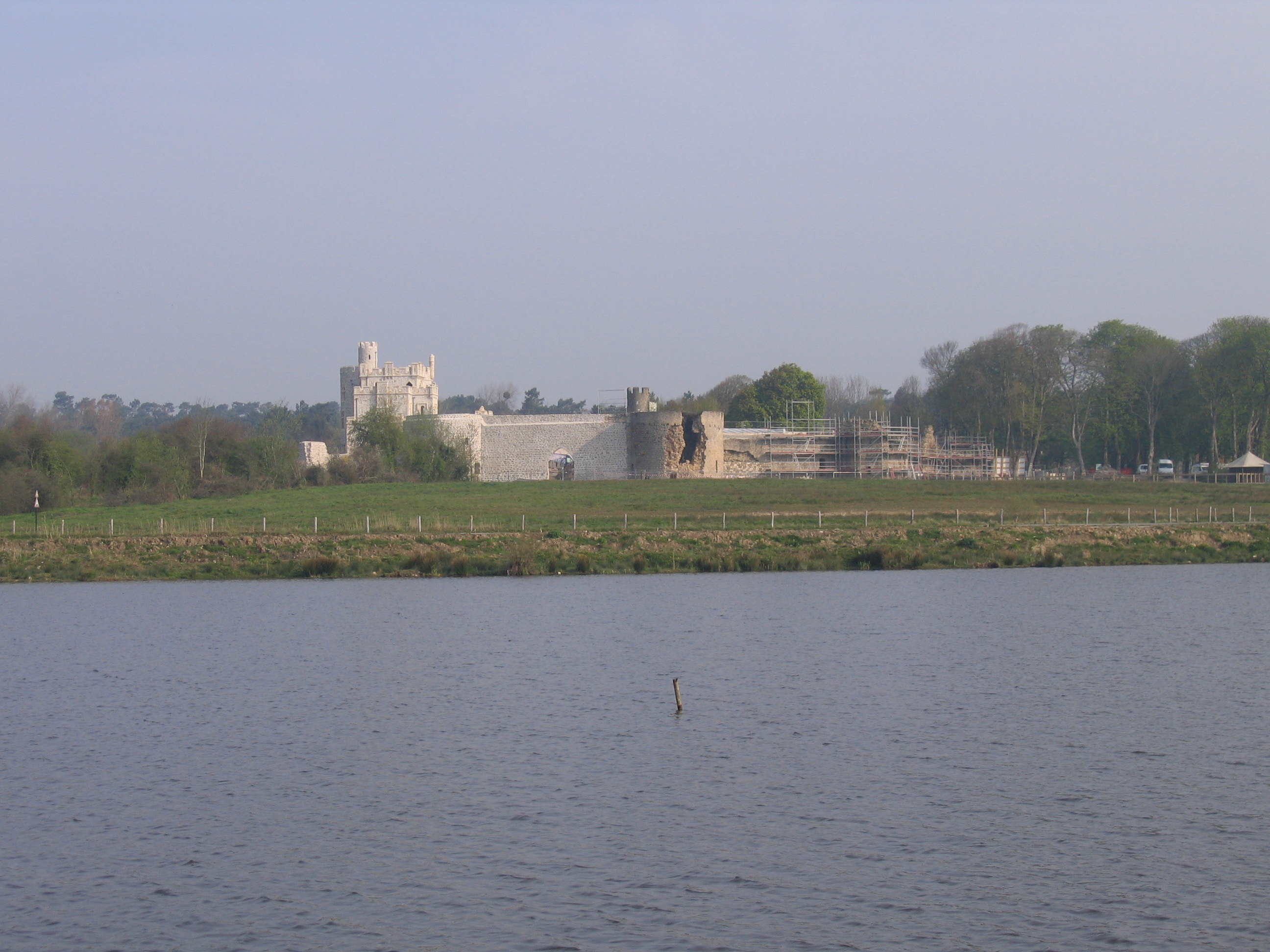 Le château d'Hardelot situé dans le Pas-de-Calais en cours de rénovation